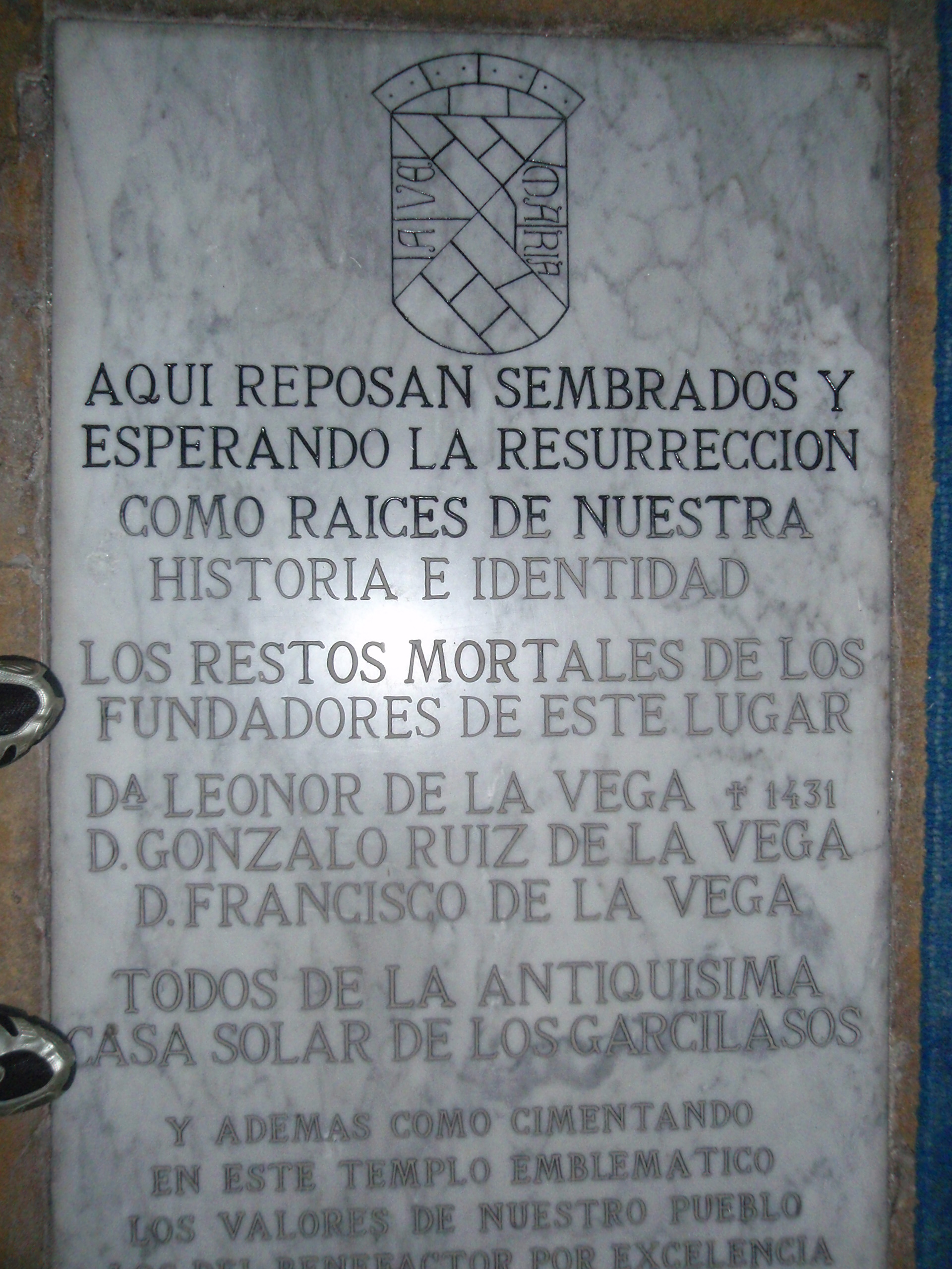 Tumba de Leonor de la Vega, en la Iglesia de la Asunción de Torrelavega.